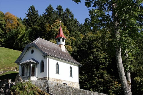 Bergkirche in Braunwald